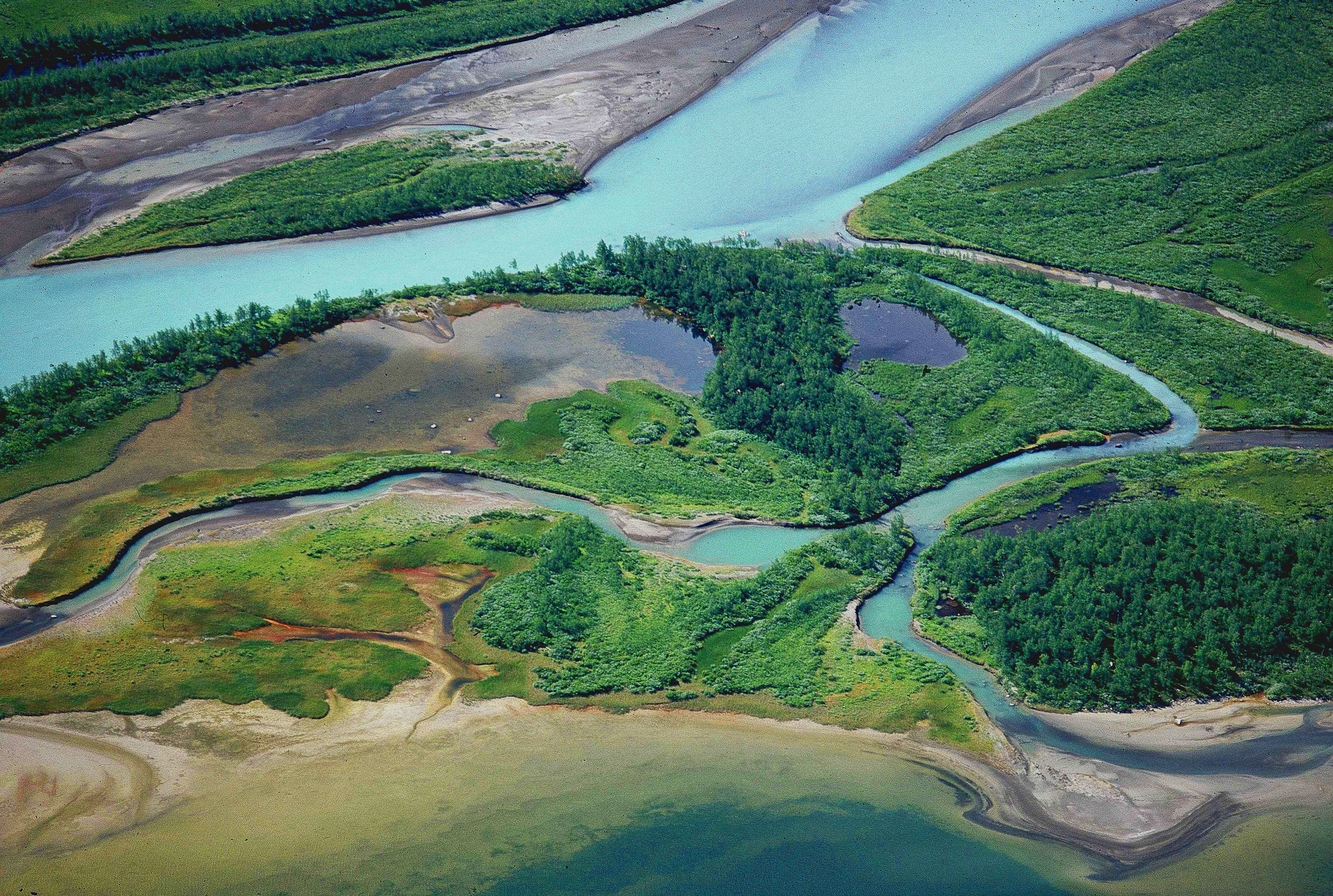 laitauredeltat, sarek